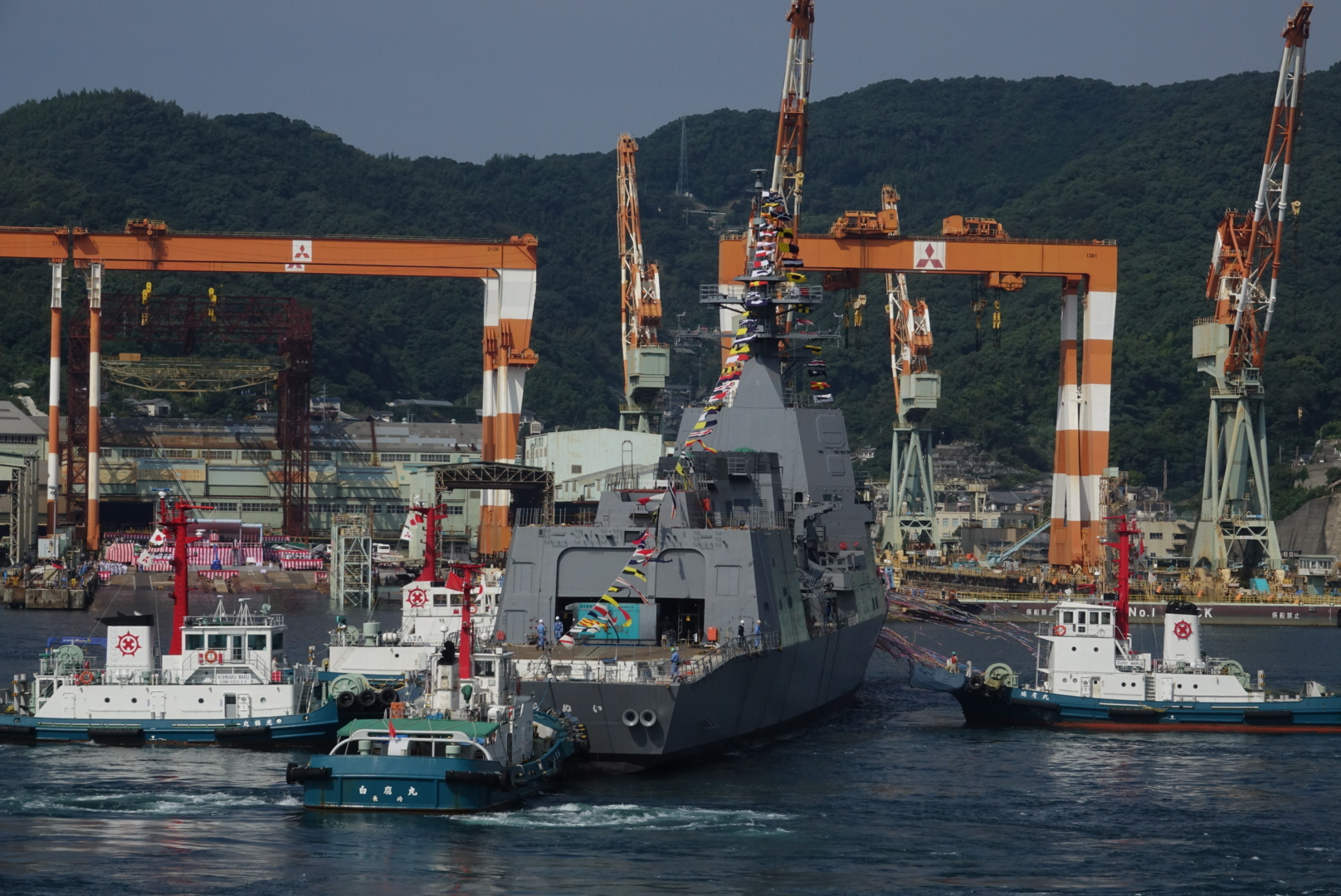 進水直後の様子